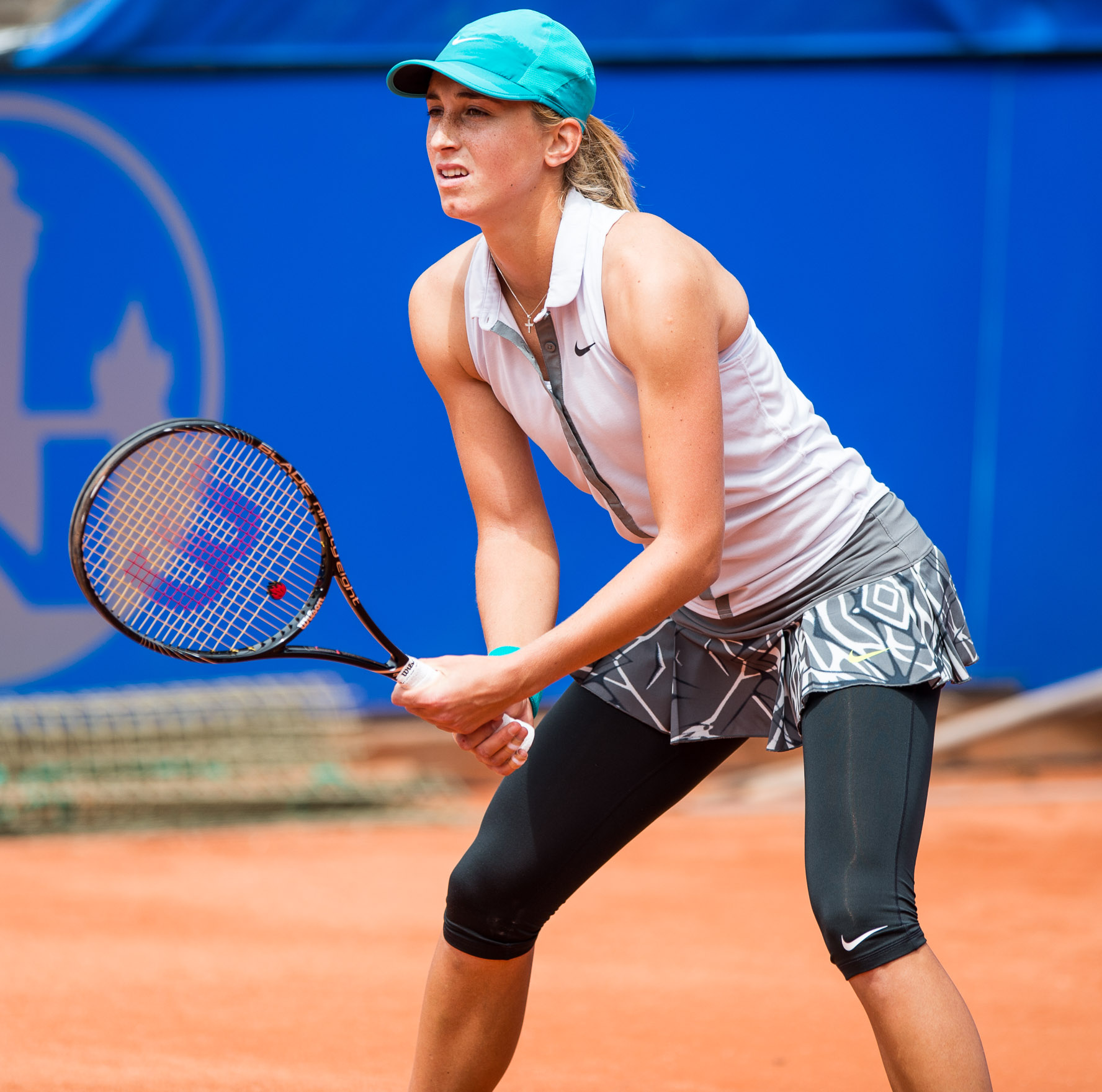 Damentennis,Nürnberger Versicherungscup 2014,Petra Martic,Petra Martic,Tennis,WTA